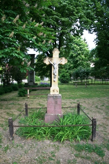 A felsőnyéki polgármesteri hivatal kertjében lévő kőkereszt (Tolna megye, Magyarország)